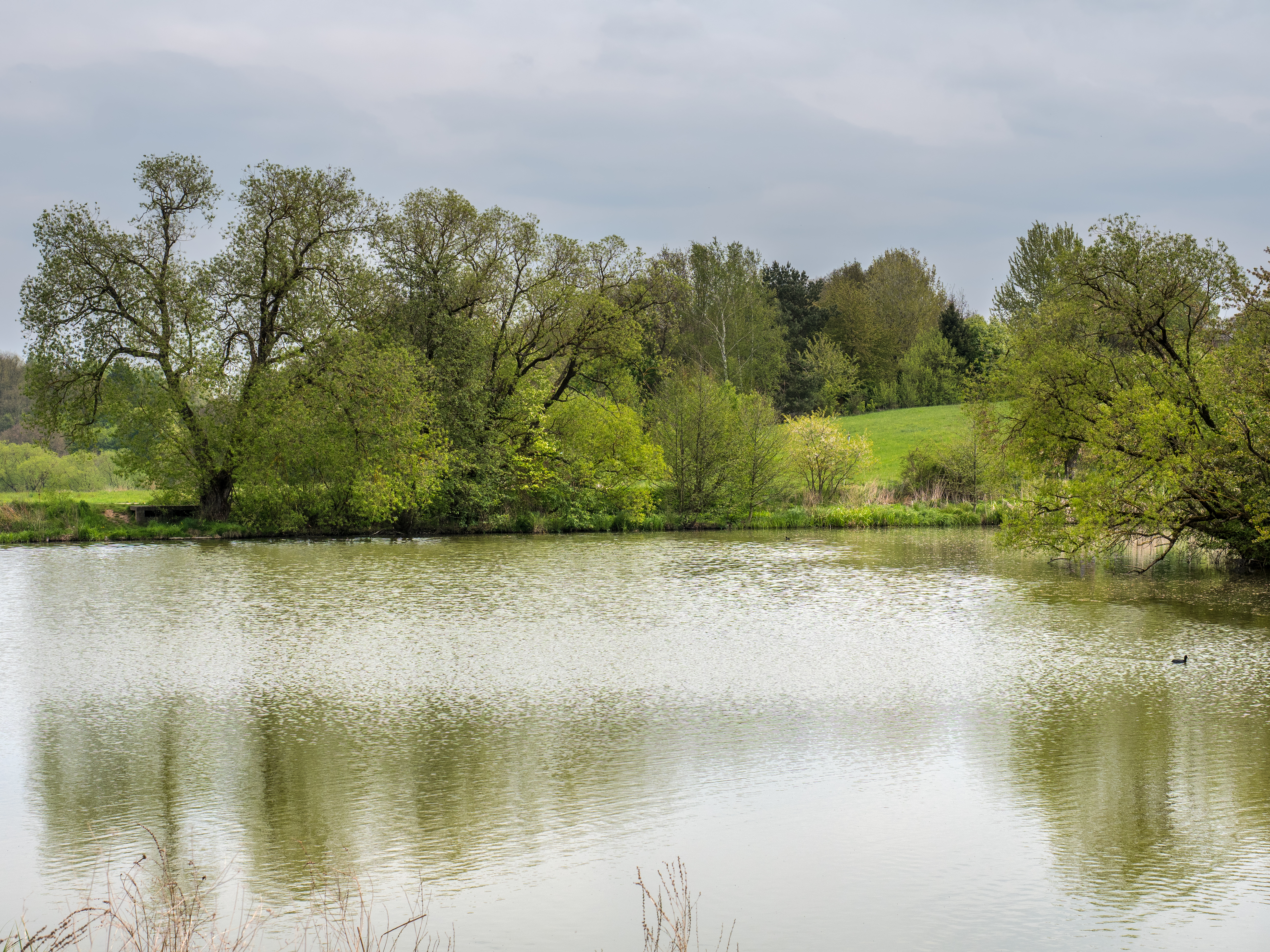 LSG Röthelbachtal in Bamberg-Gaustadt